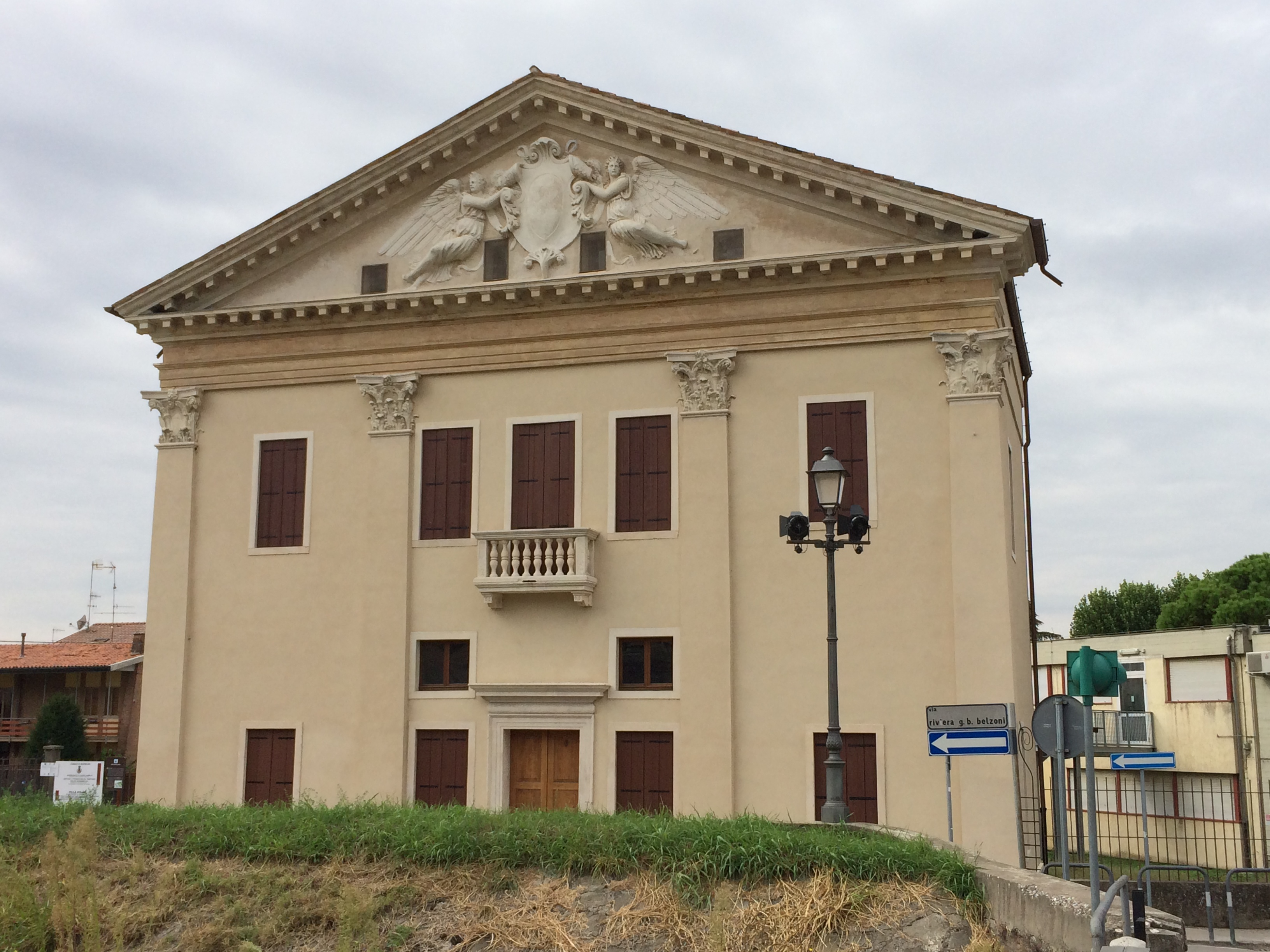 Monselice-VillaPisani-01